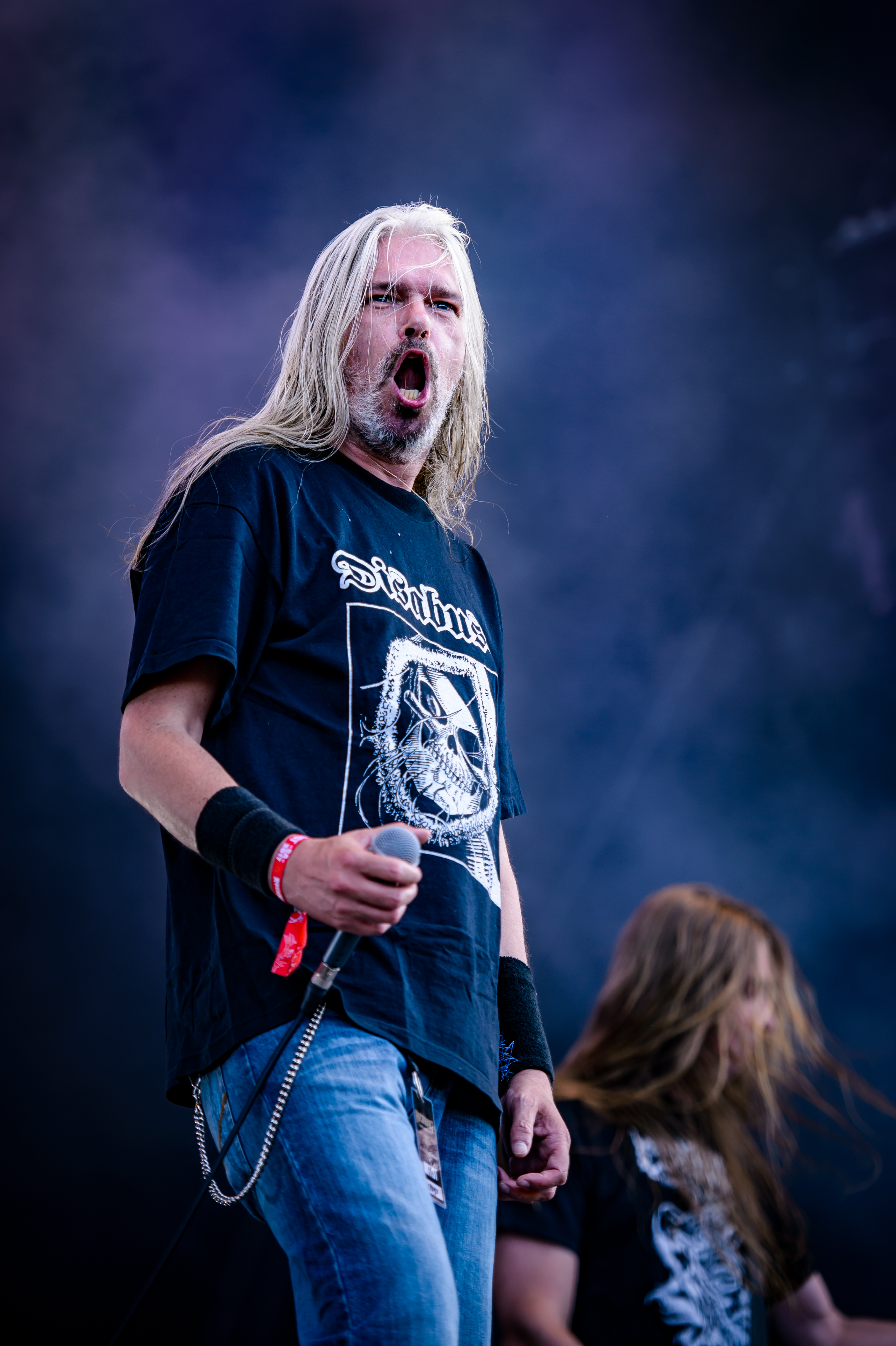 'RockHarz Open Air 2017; Ballenstedt': 'Asphyx'